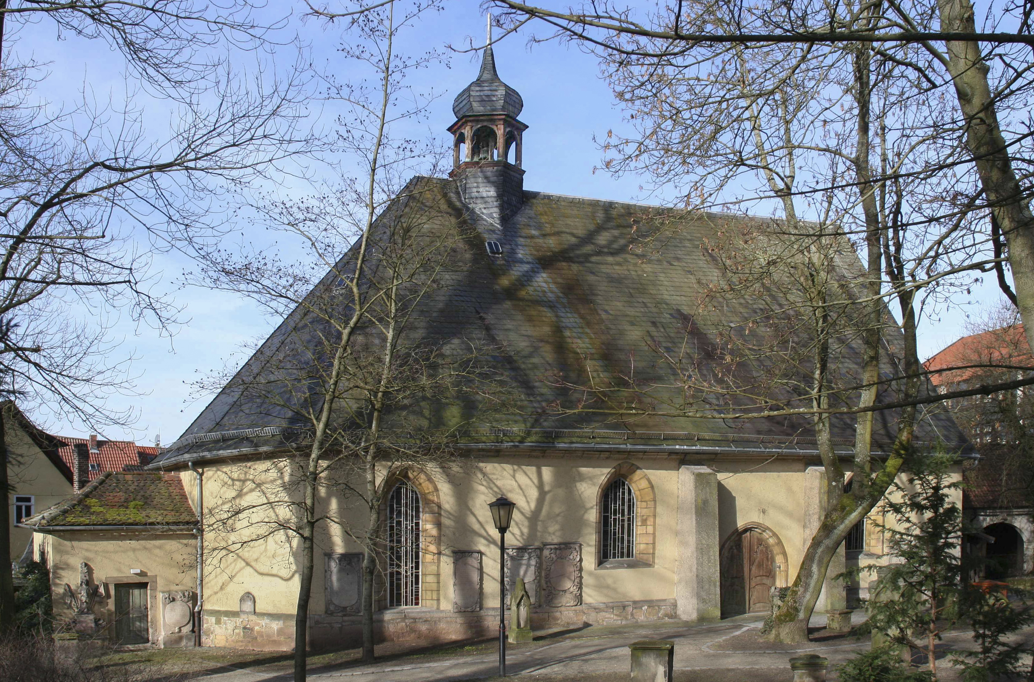 Salvatorkirche Coburg, Innenstadt